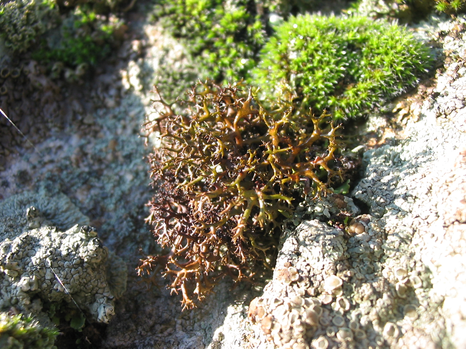 Fotografía realizada por Pablo Alberto Salguero Quiles a un ejemplar de 5cm. de altura de Cetraria aculeata en la zona centro de la Península Ibérica. Valle del río Lozoya, Madrid. España.